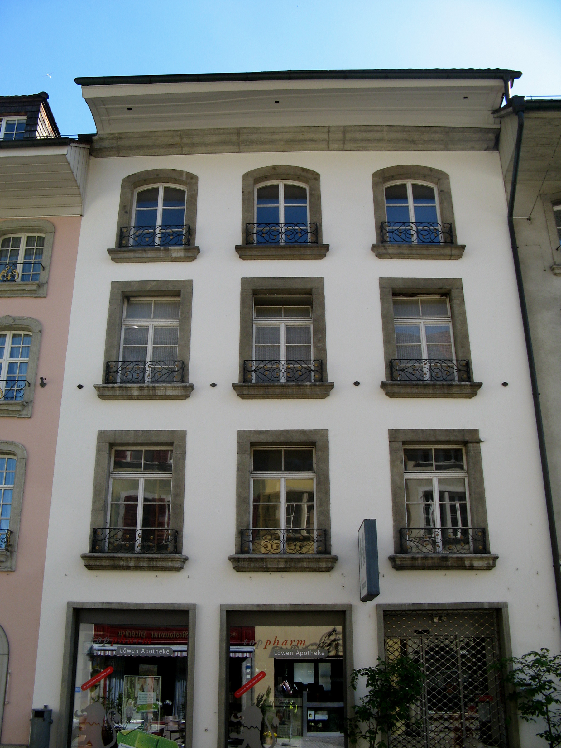 Ehemalige Landschreiberei an der Rathausgasse 36 in Lenzburg